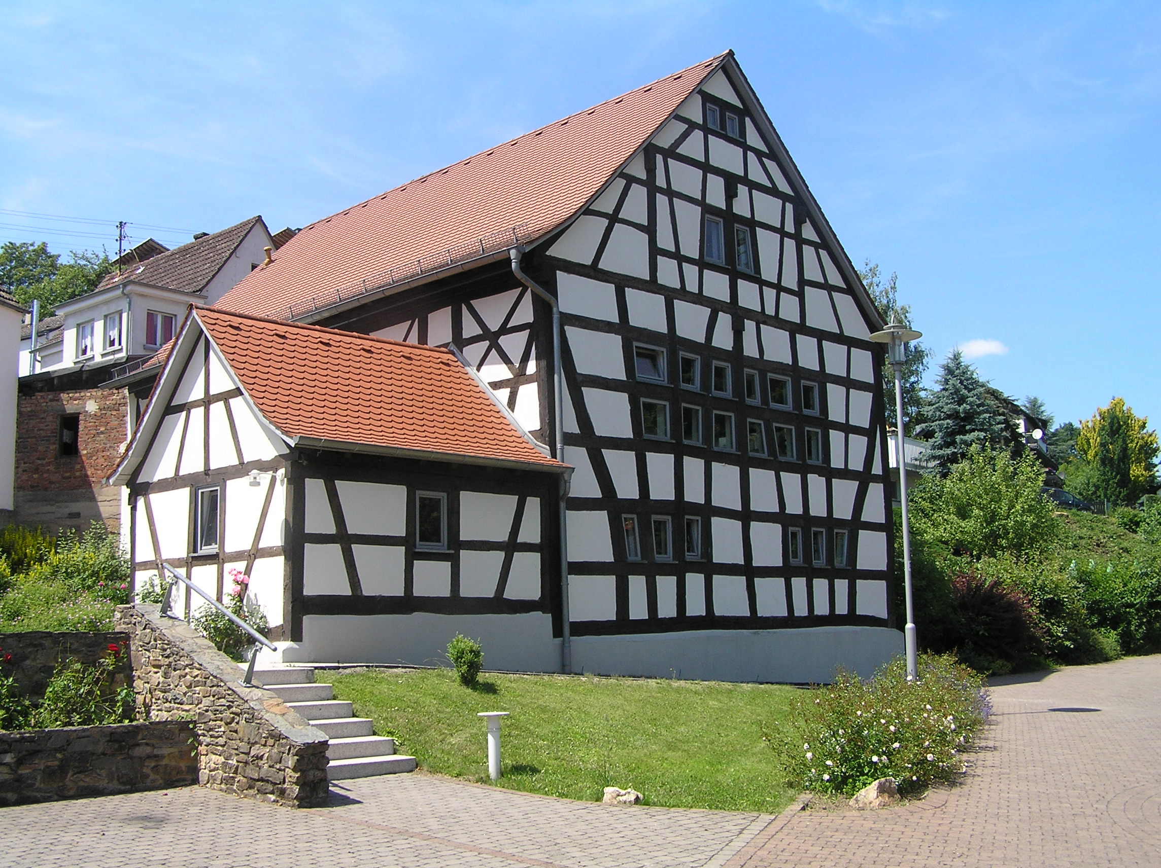 Katholisches Gemeindehaus St. Michael (Pfarrscheune) in Ehlhalten. 1999 wurde die ursprüngliche Scheune des Gehöfts Gräfliche Straße 6 zum Gemeindehaus der Kirchengemeinde St. Michael umgebaut.